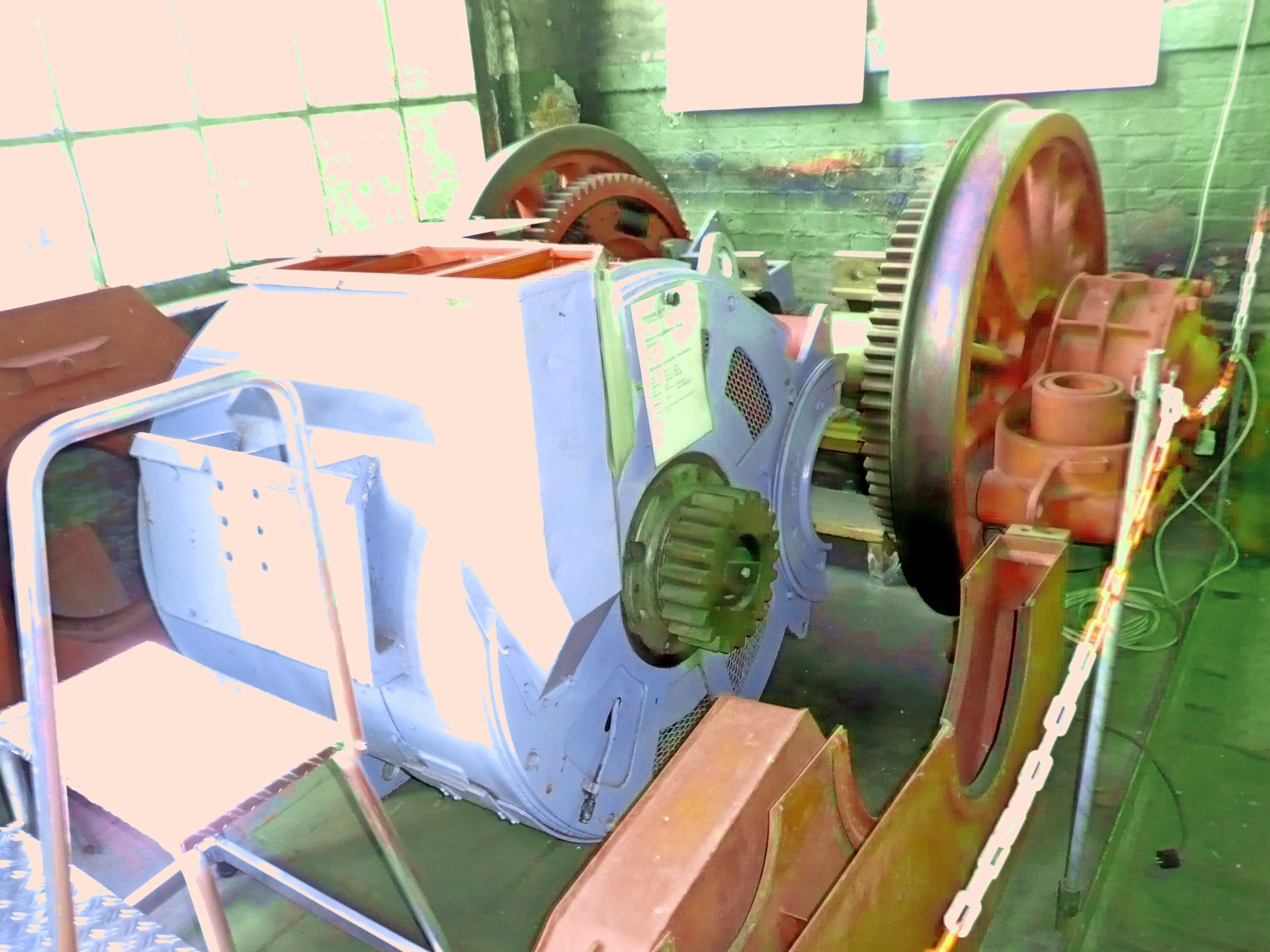 Tatzlager-Antrieb im DB Museum Halle